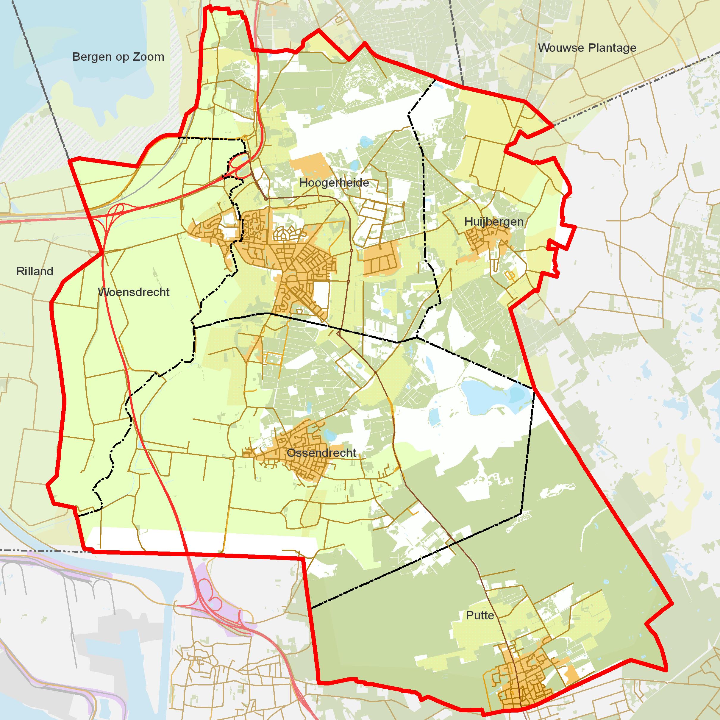 BAG woonplaatsen - Gemeente Woensdrecht.png